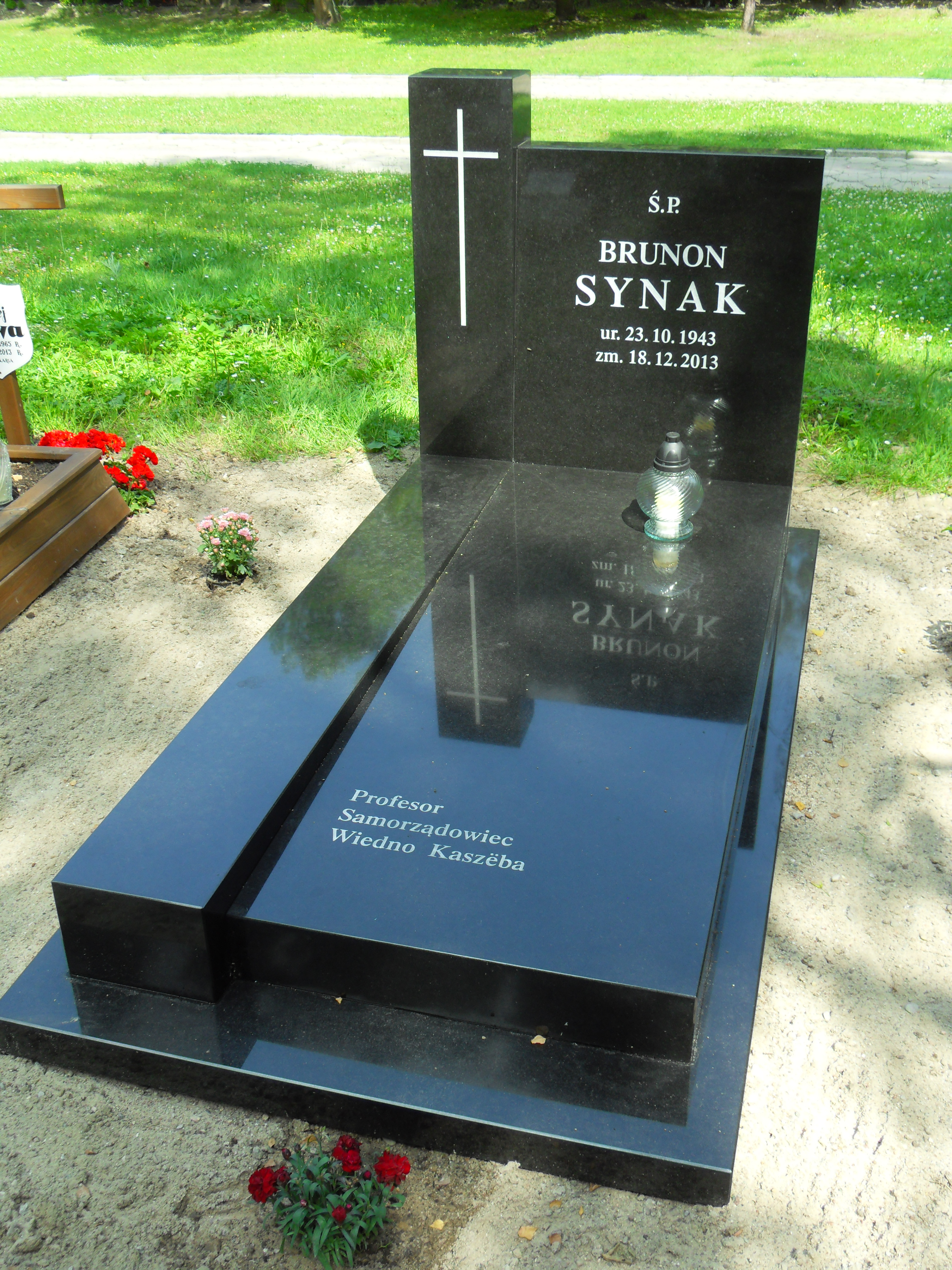 Gdańsk Wrzeszcz. Cmentarz Srebrzysko, grób Brunona Synaka.